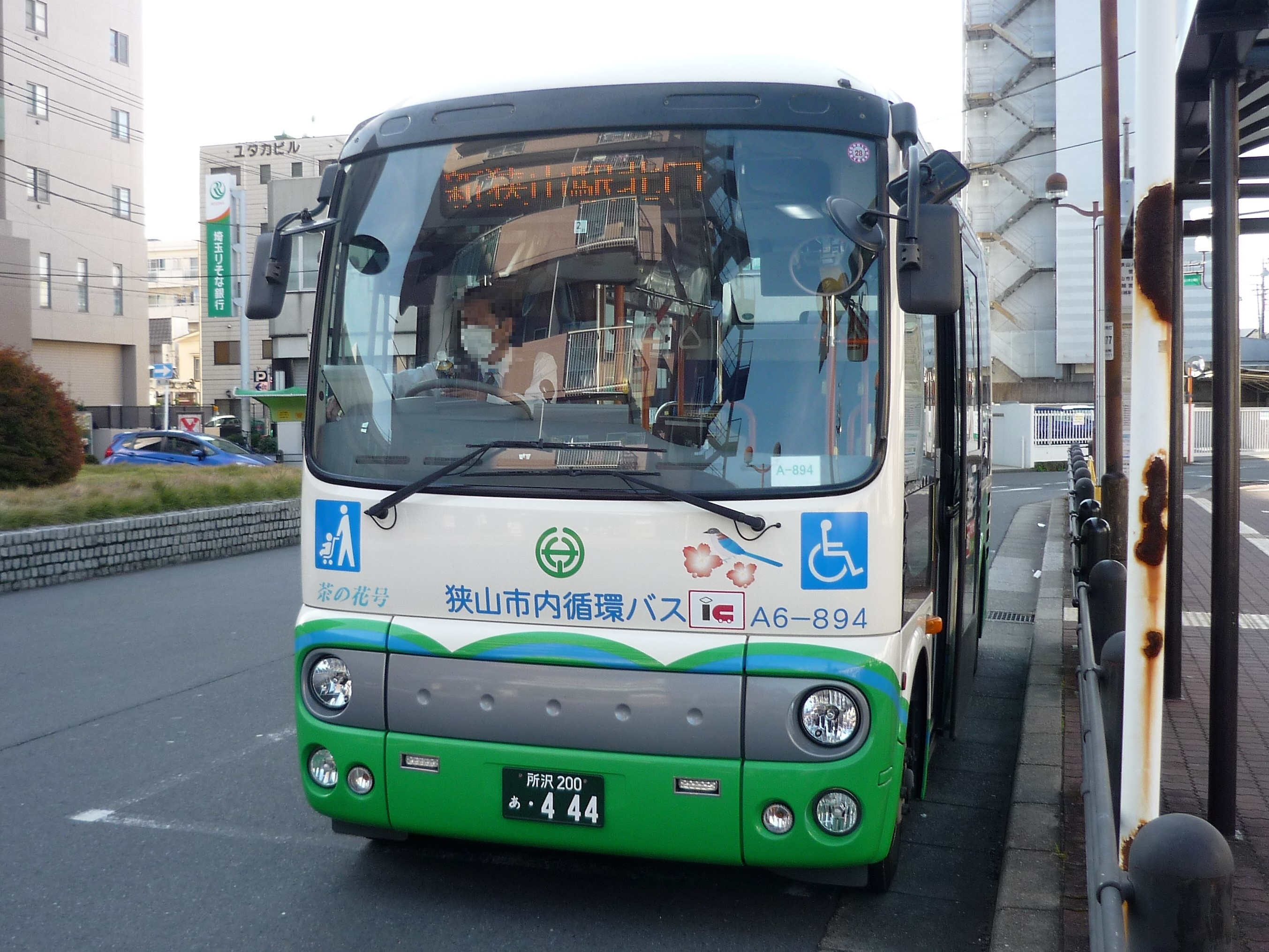 新狭山駅南口に停車中の狭山市内循環バス「茶の花号」 Panasonic Lumix DMC-FS3